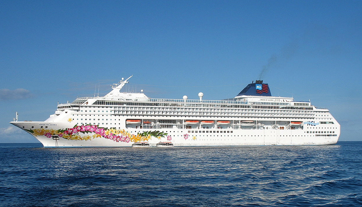 Pride of Aloha auf Fahrt